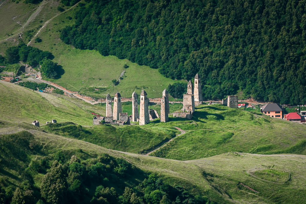 Башни в древнем ингушском городе-поселении Эрзи (Джейрахский район, Ингушетия)